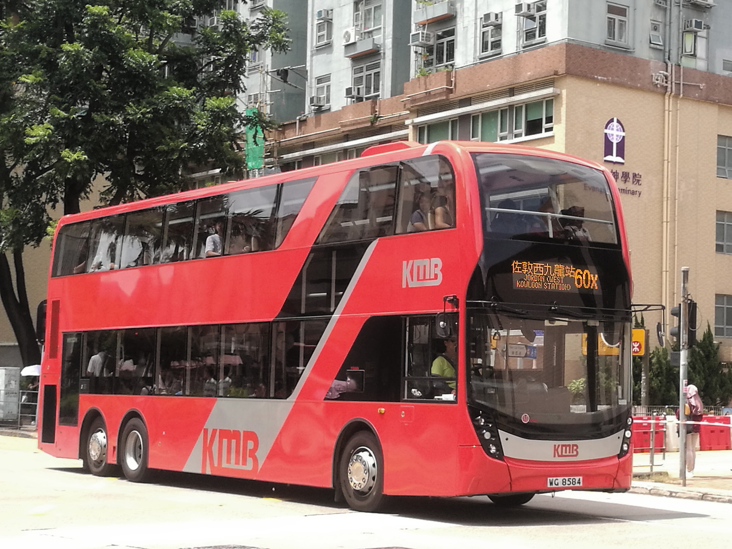 Trident E500 Turbo E6X8